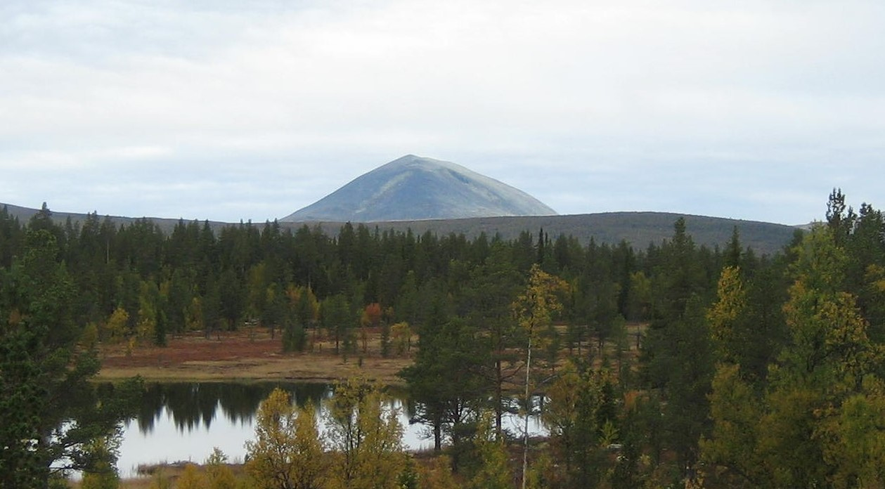 Heidalsmuen (Mukampen) - bilde tatt fra Øybekklia, Skåbu.